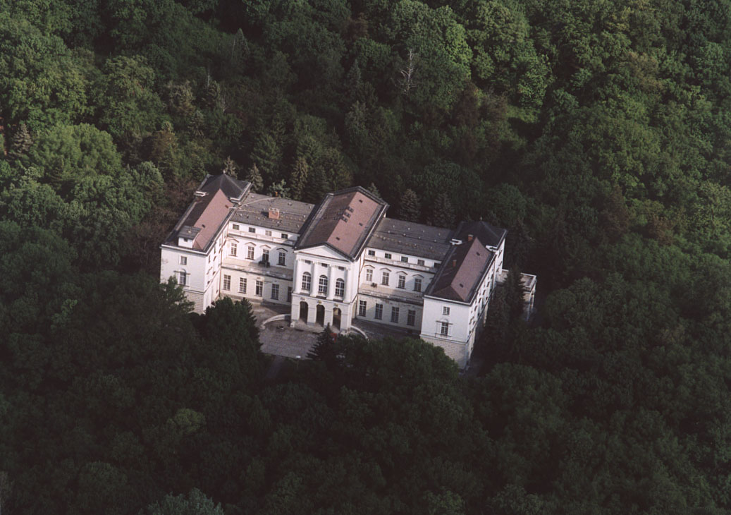 Palace - Újszász - Hungary - Europe (Orczy Mansion)